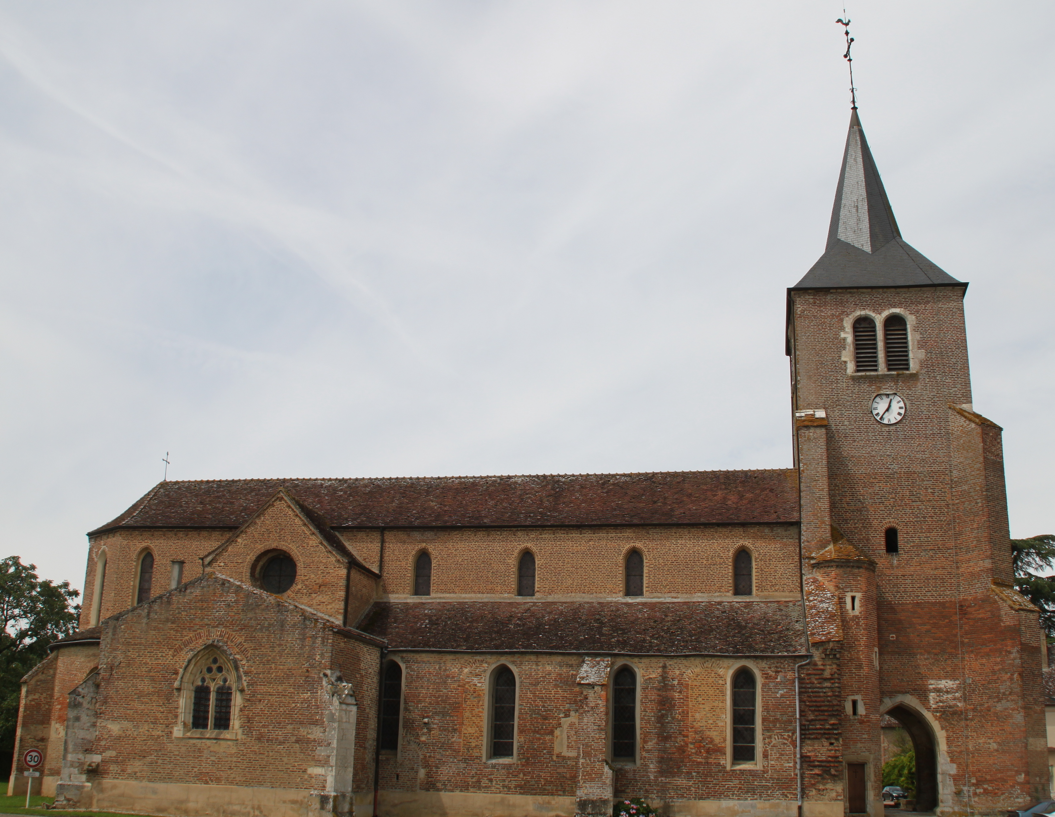 L'église de l'Immaculée-Conception à Bellevesvre